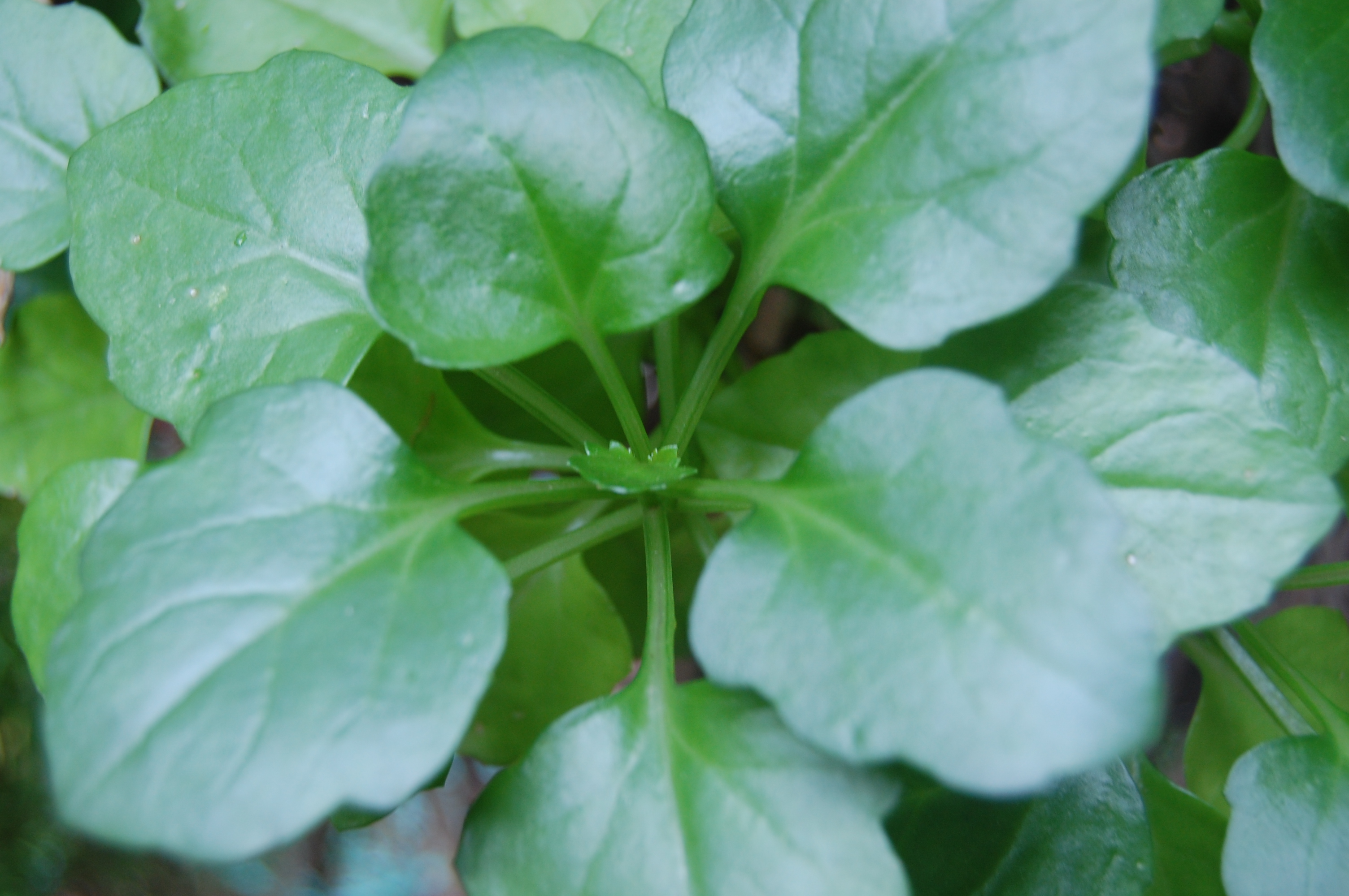 Senecio angulatus